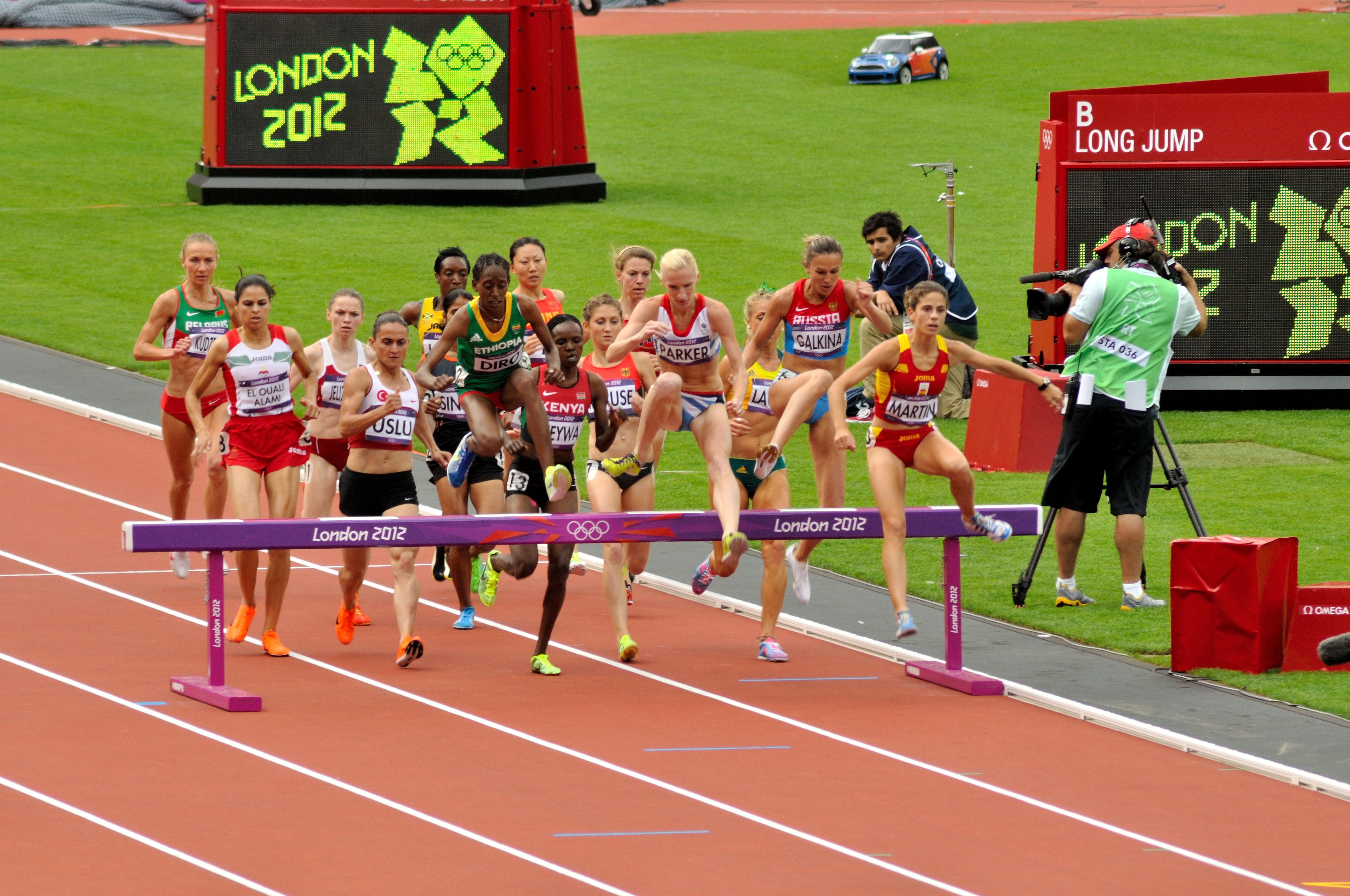 London 2012 Womens 3000m Steeplechase, Sviatlana Kudzelich, Salima El Ouali Alami, Polina Jelizarova, Binnaz Uslu, Korene Hinds, Etenesh Diro, Zhenzhu Li, Milcah Chemos Cheywa, Gesa Felicitas Krause, Shalaya Kipp, Barbara Parker, Gulnara Galkina, Diana Martín